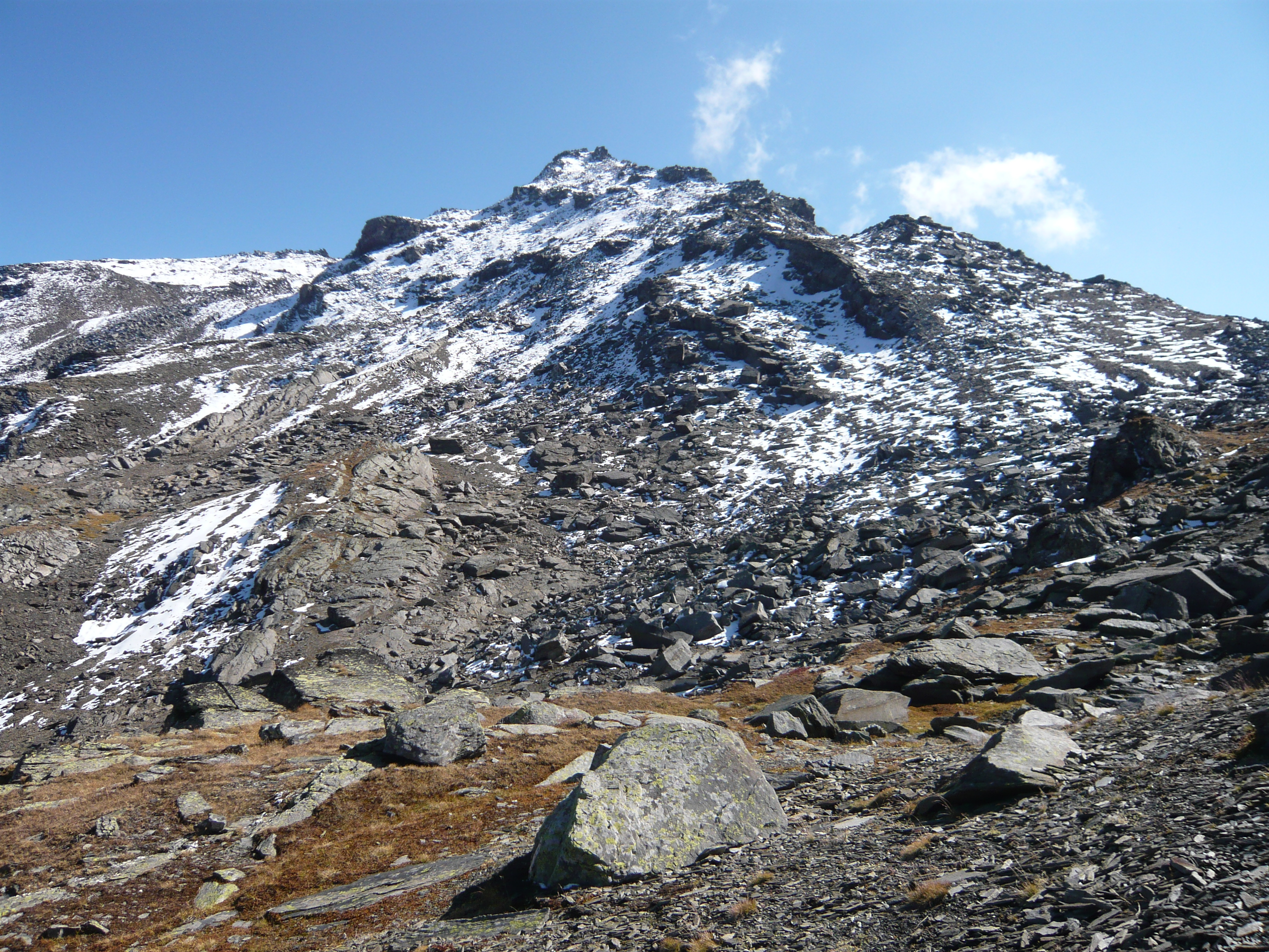 Le mont Brequin, pris du sentier avant d'arriver au col de la vallée étroite